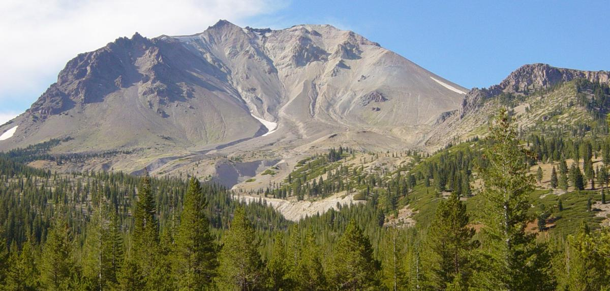 Lassen Peak from Devastated Area